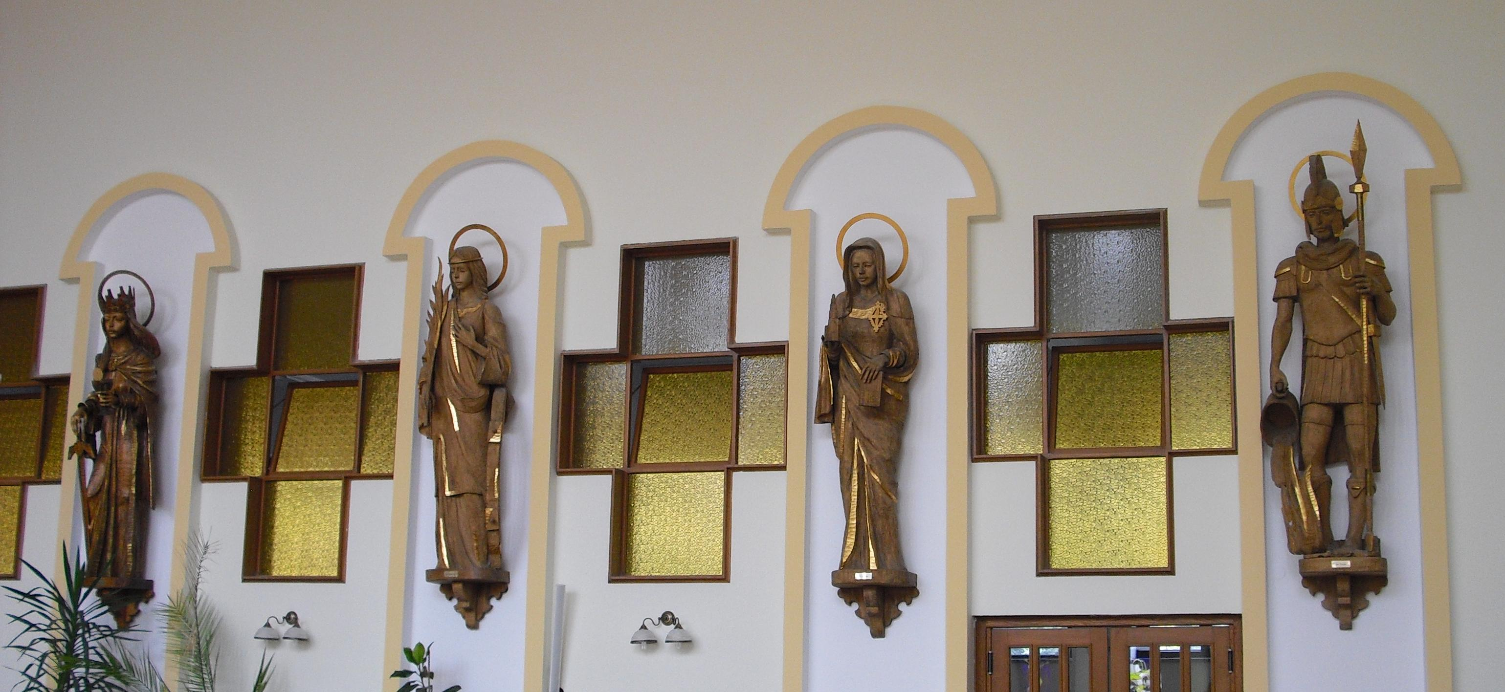 Kościół Parafii Najświętszego Serca Pana Jezusa i św. Jana Bosko w Piotrowicach. Figury świętych.